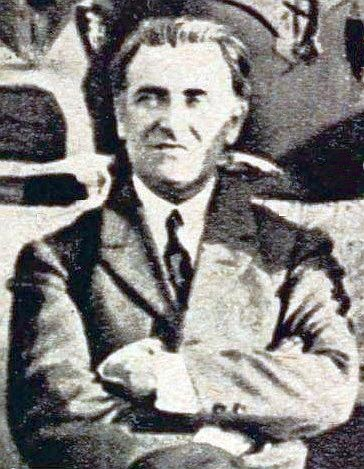 Le docteur Busquet, Président du RC Toulon au début des années 1920.